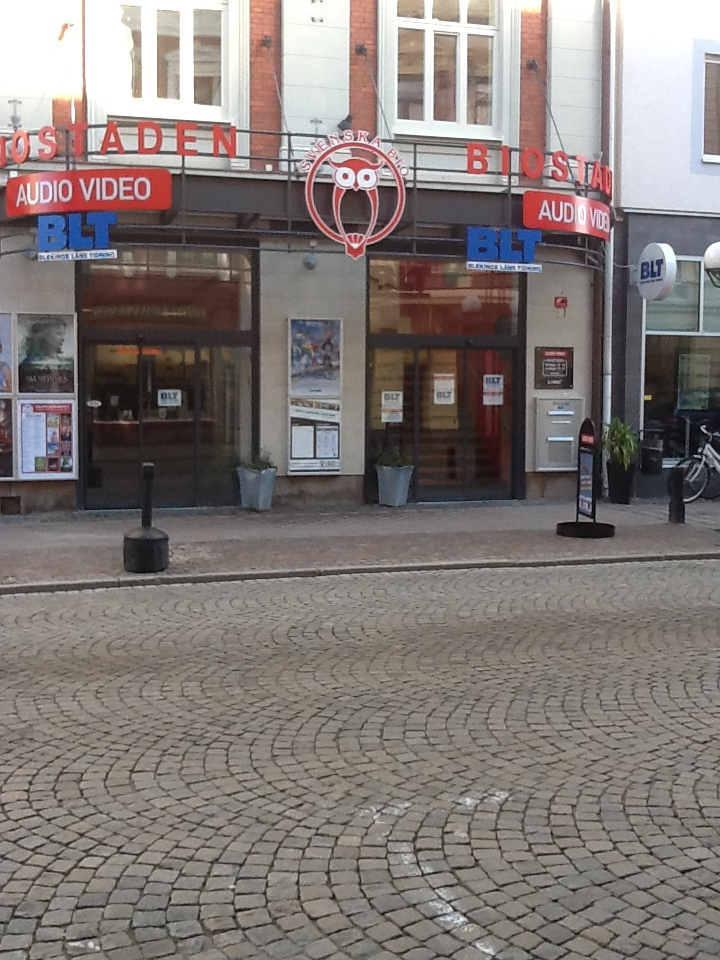 BLTs kontor